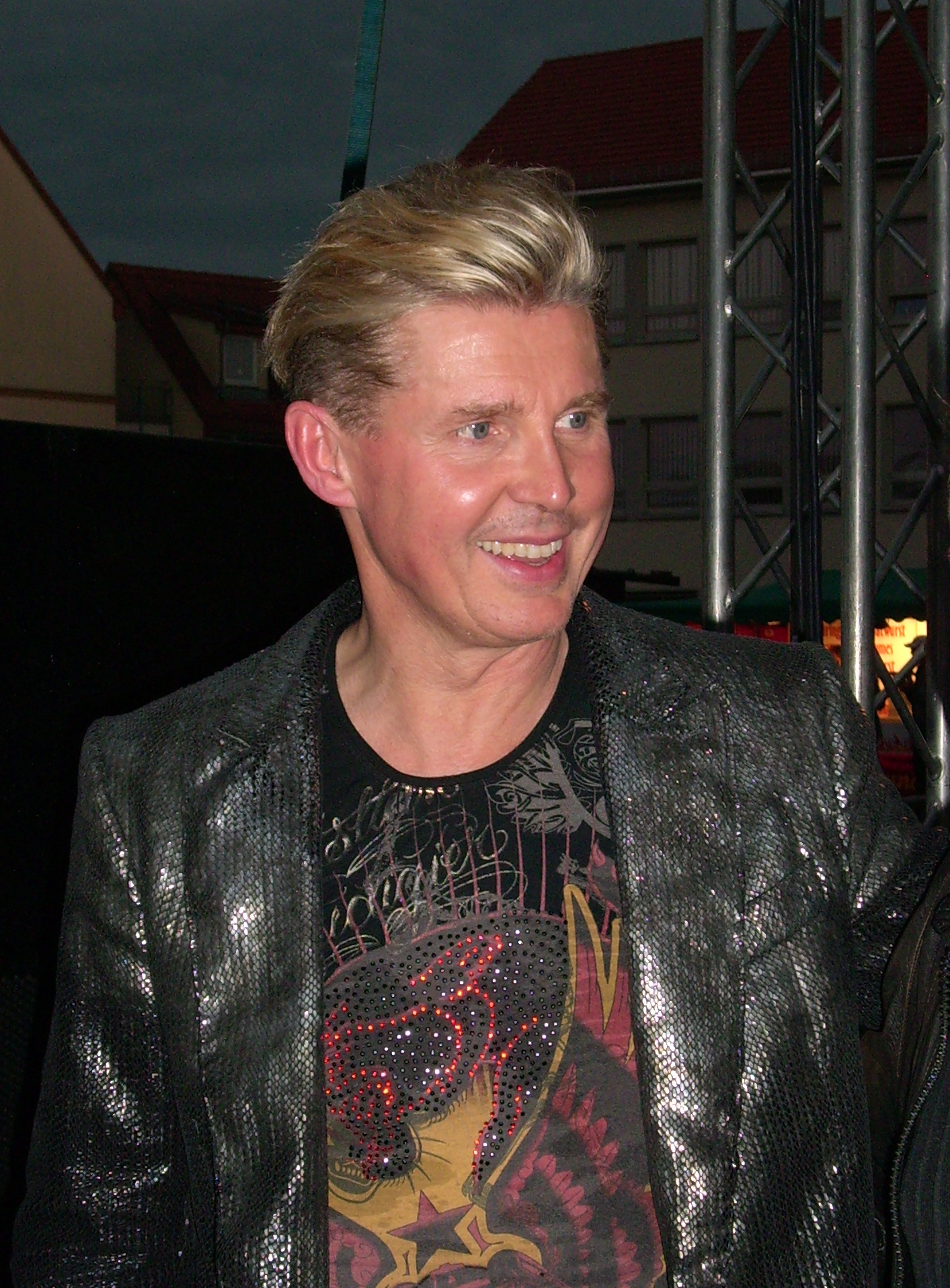 Markus Mörl nach einem Auftritt 2012